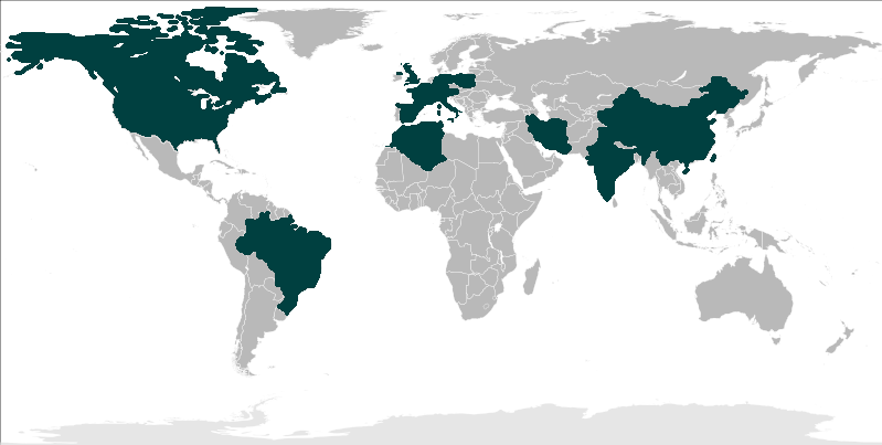 Mapa ISKO